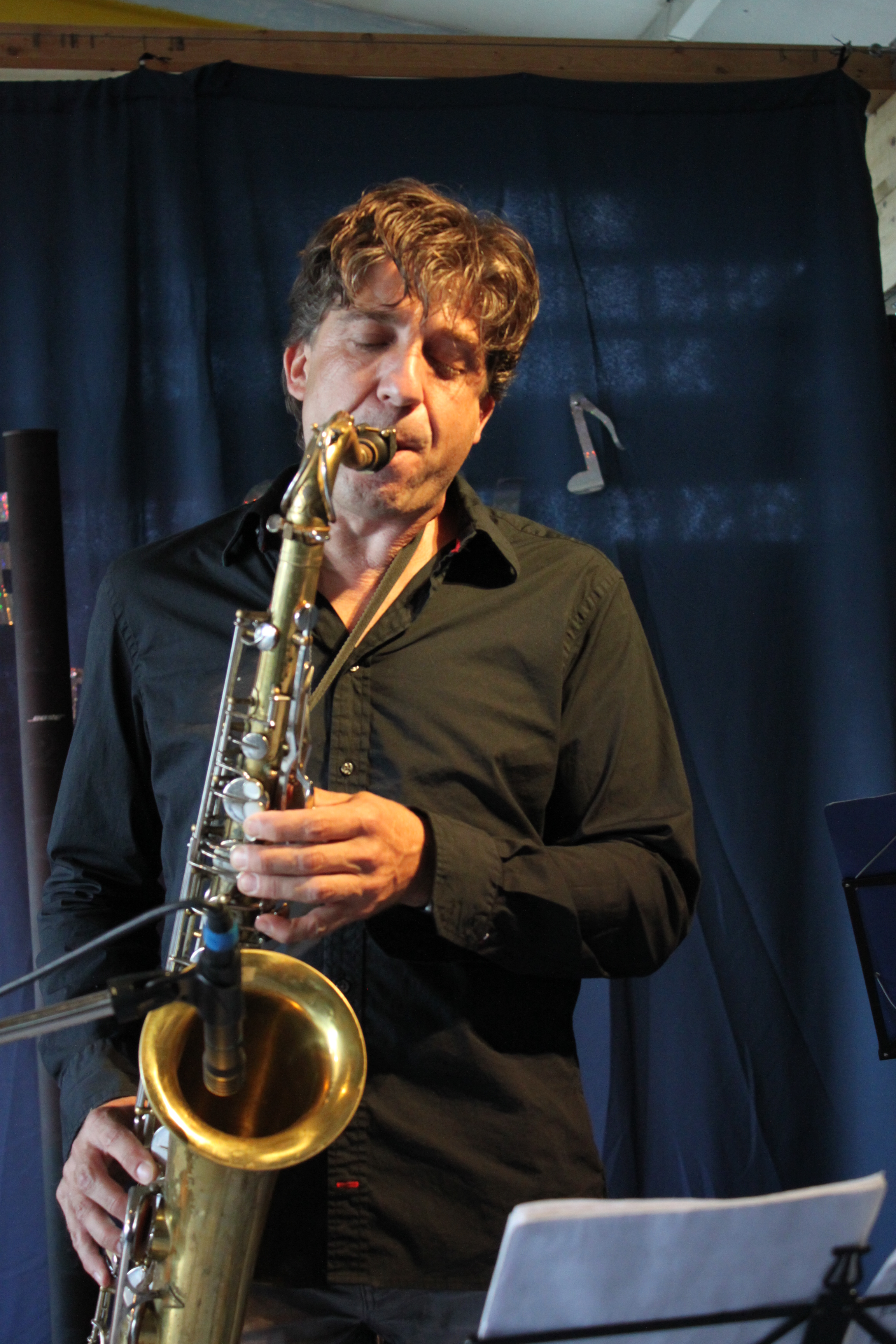 Falk Breitkreuz bei einem Konzert im "Jazz We Can" in Bad Marienberg (Westerwald) 2011